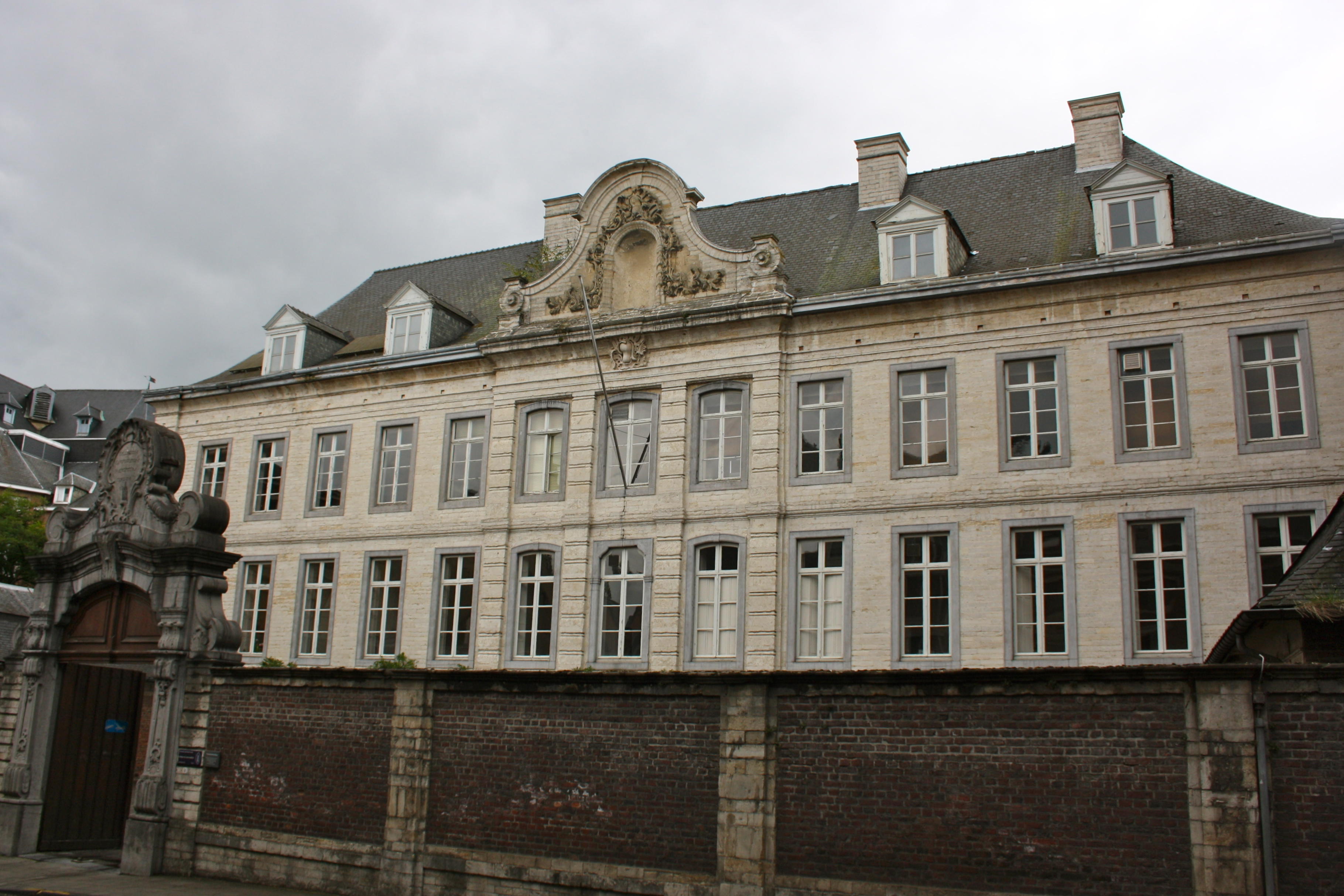 College van Premonstreit, Naamsestraat 61, Leuven.